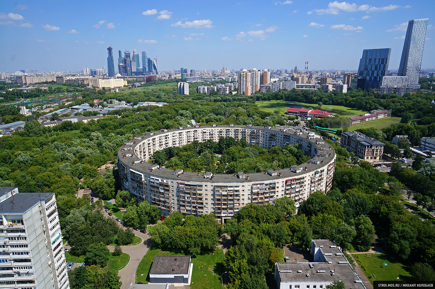 Круглый дом в Москве на улице Довженко, 6, построен в 1979 г. по проекту архитектора Евгения Стамо и инженера Александра Маркелова